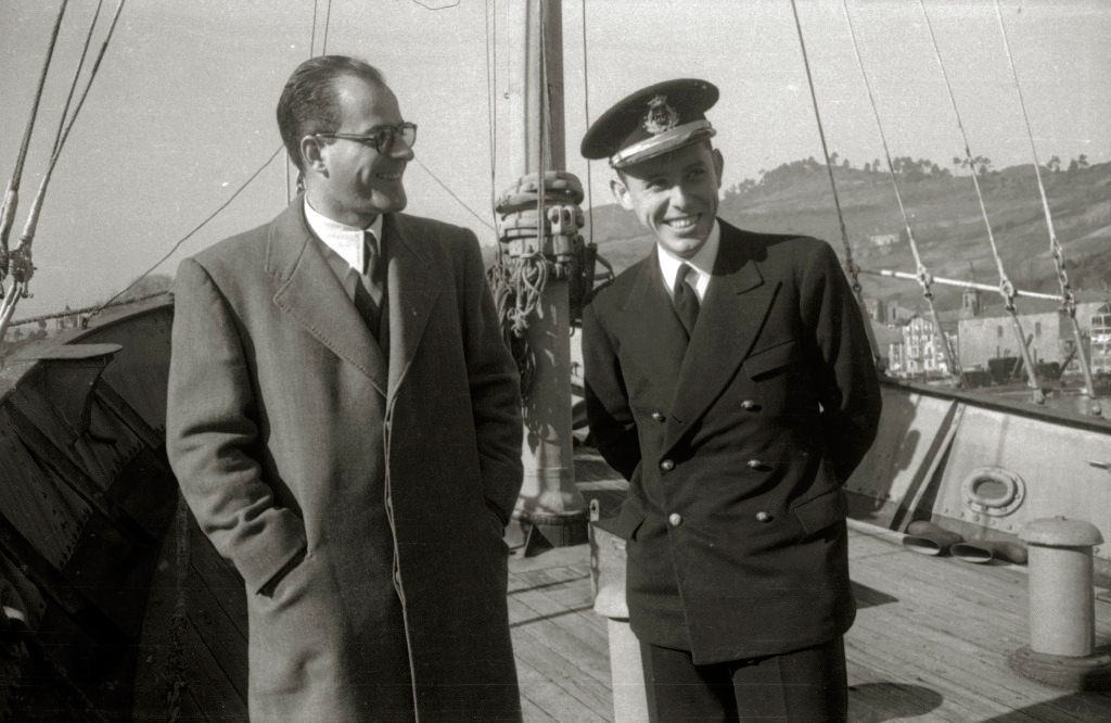 Título original: Cristóbal Colón, duque de Veragua, en Pasaia como comandante del buque de vigilancia "V-18" Localización: Pasajes (Guipúzcoa)